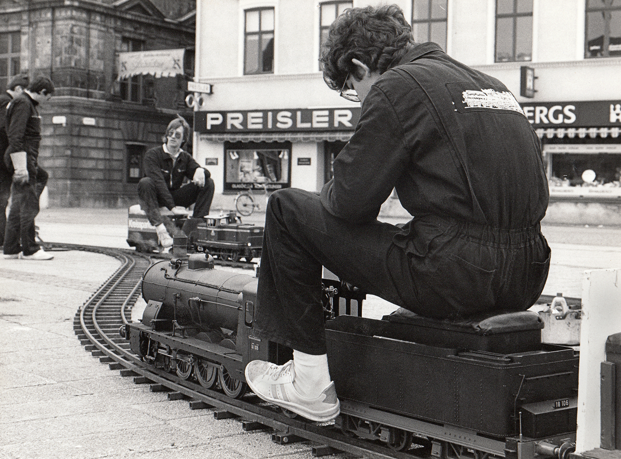 Modelljärnväg på Stortorget i Malmö 1987.